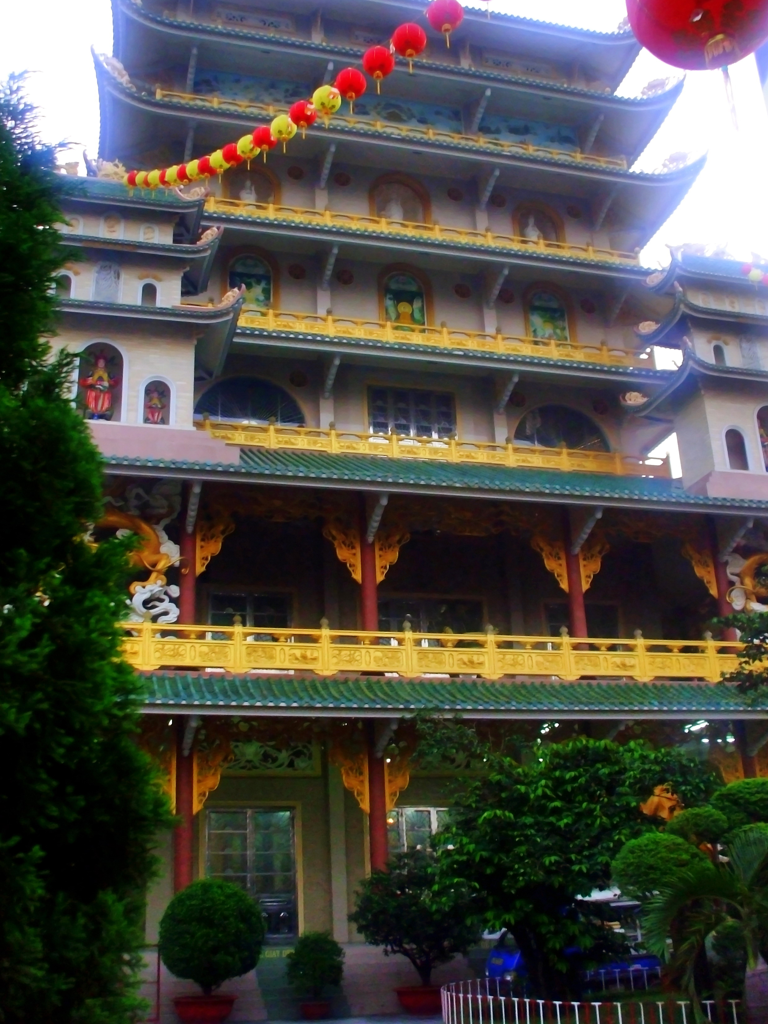 Chính điện chùa Vạn Đức ở Thủ Đức, Tp. Hồ Chí Minh, Việt Nam